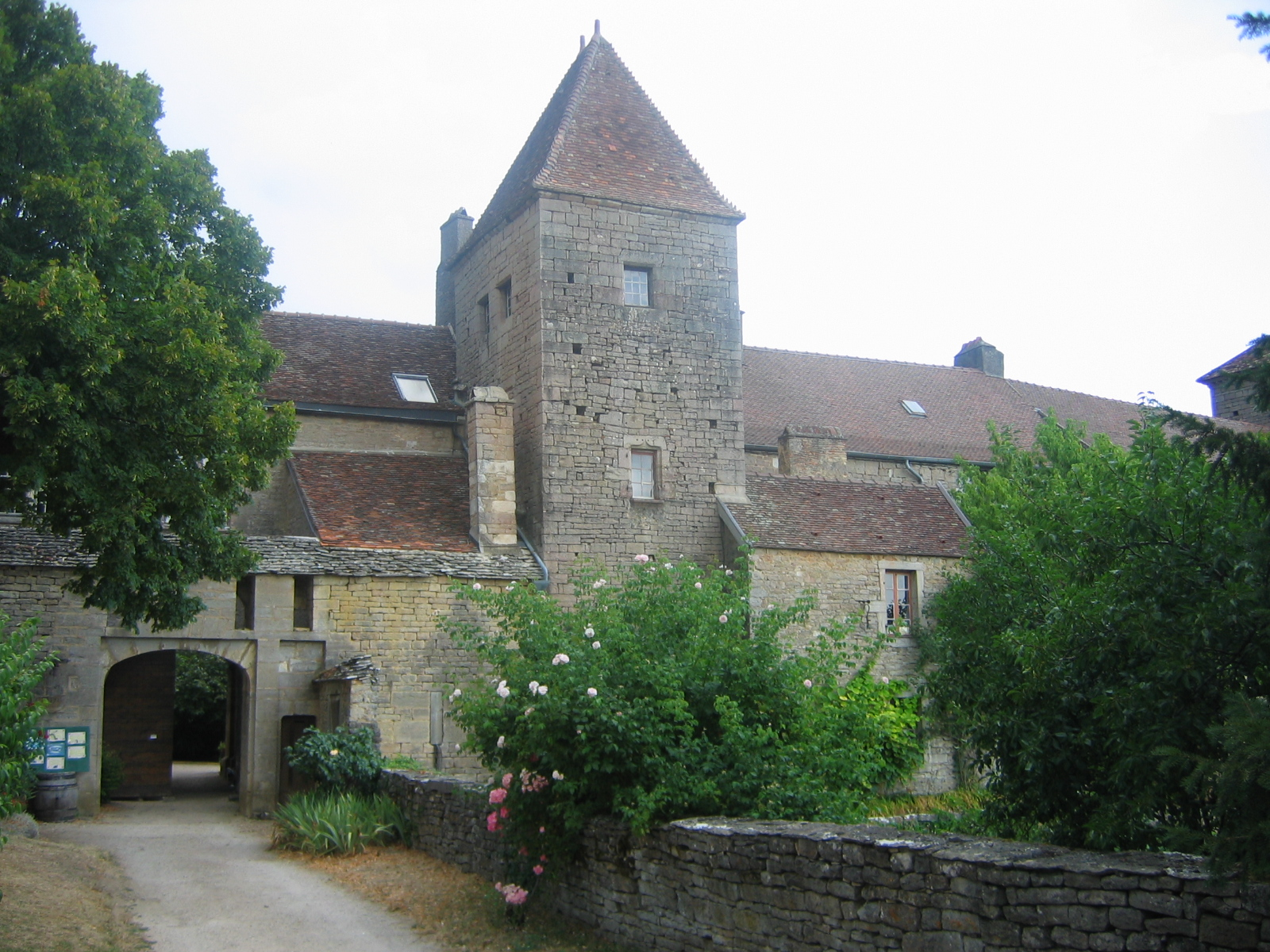 Château de Gevrey-Chambertin, Gevrey-Chambertin, Côte-d'Or, Bourgogne, France.